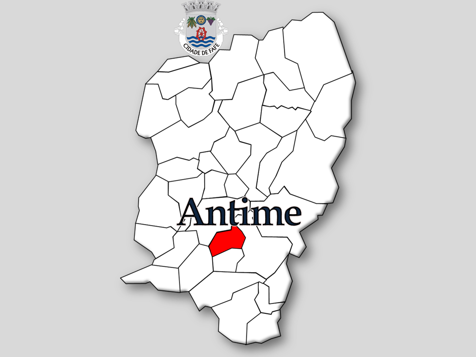 Censos 1864/2011